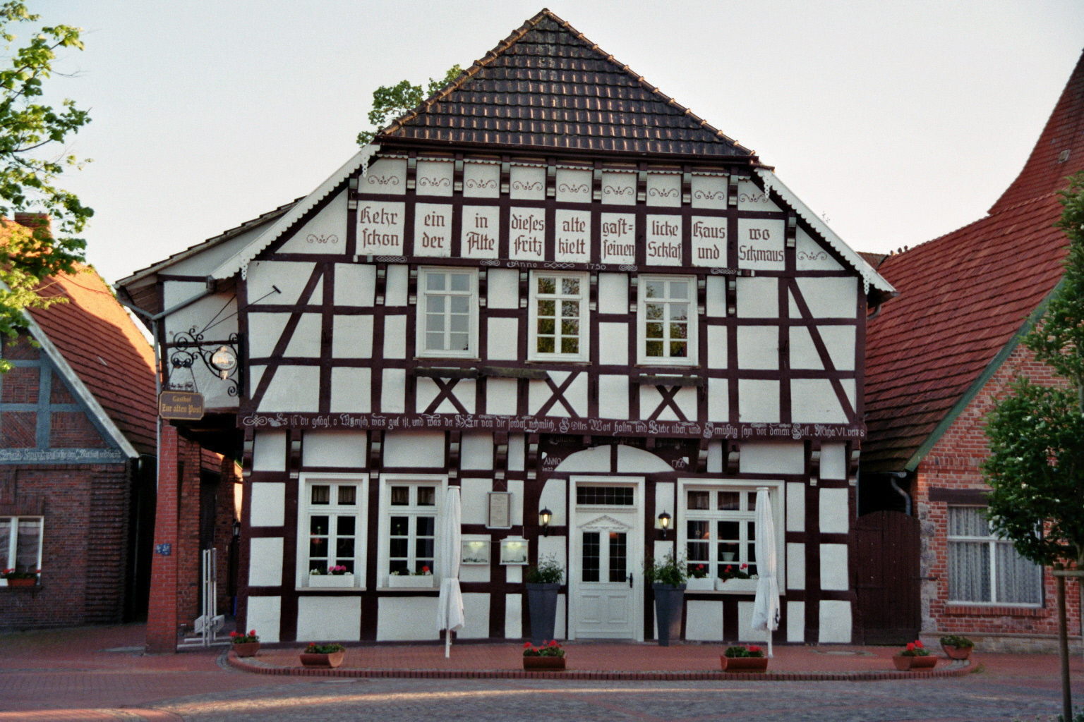 Historischer Gasthof “Zur alten Post” in Hopsten-Schale, Kreis Steinfurt, Nordrhein-Westfalen, Deutschland.